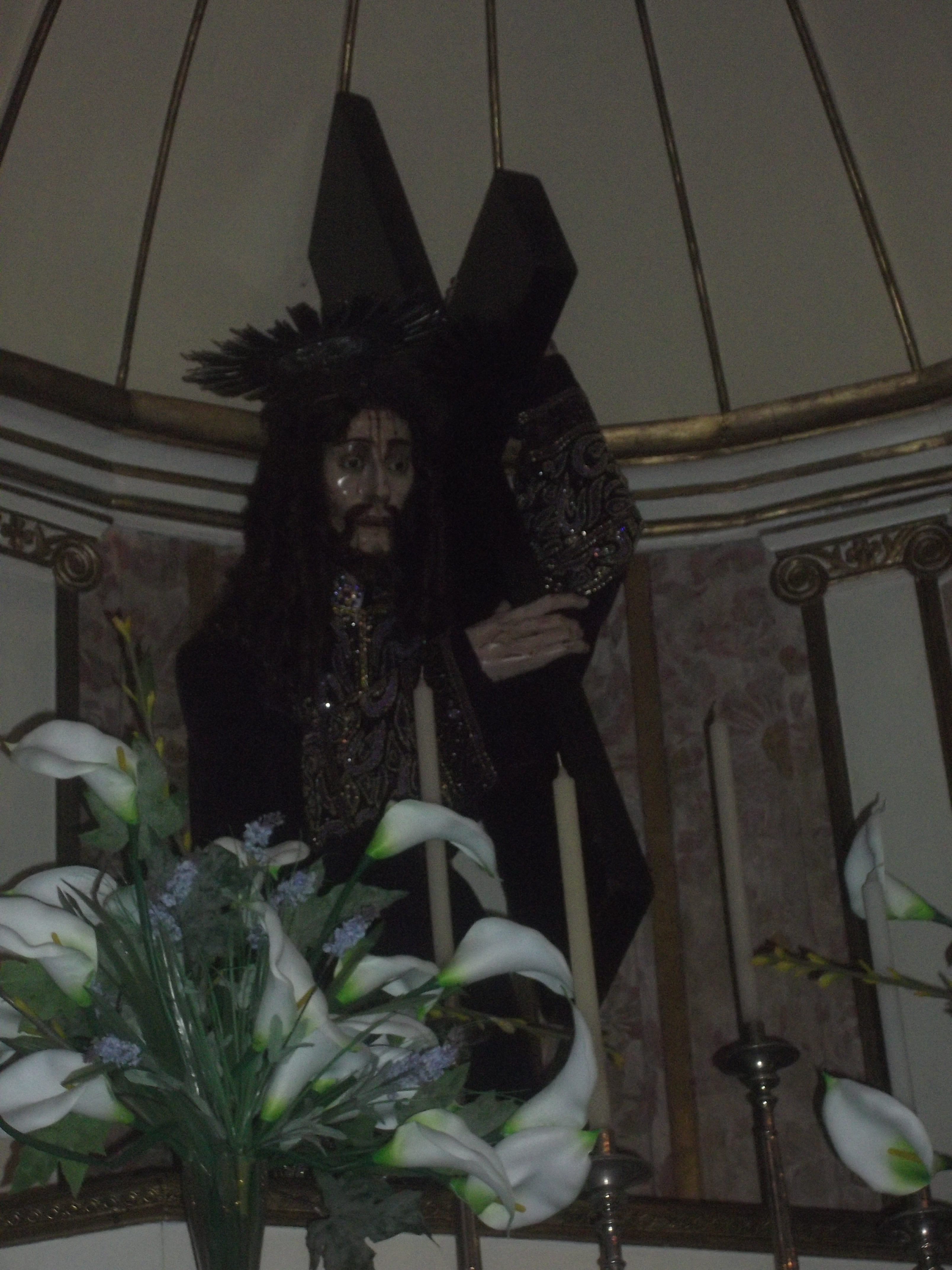 Capela do Menino Deus, Imperial Hospital de Caridade, Florianópolis, Brasil